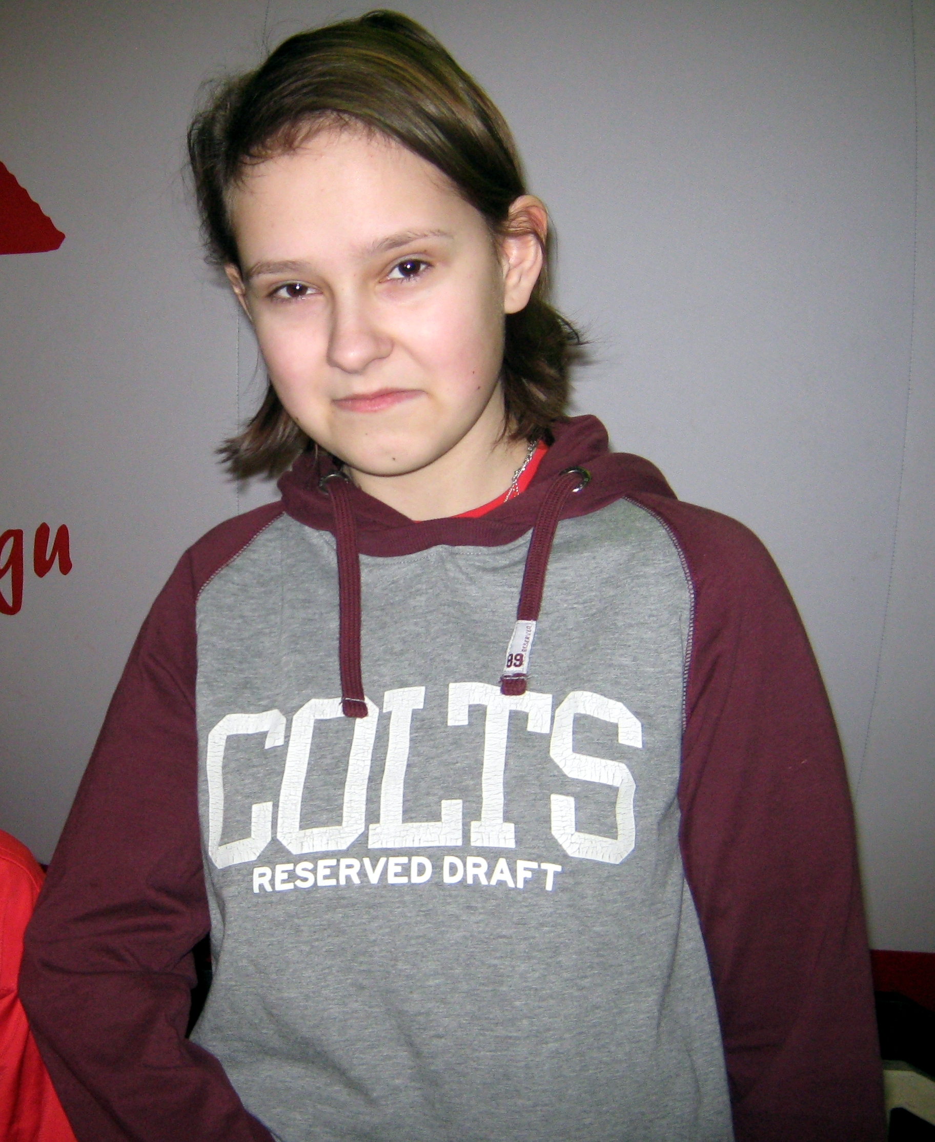 Karolina Pęk w 2013 roku